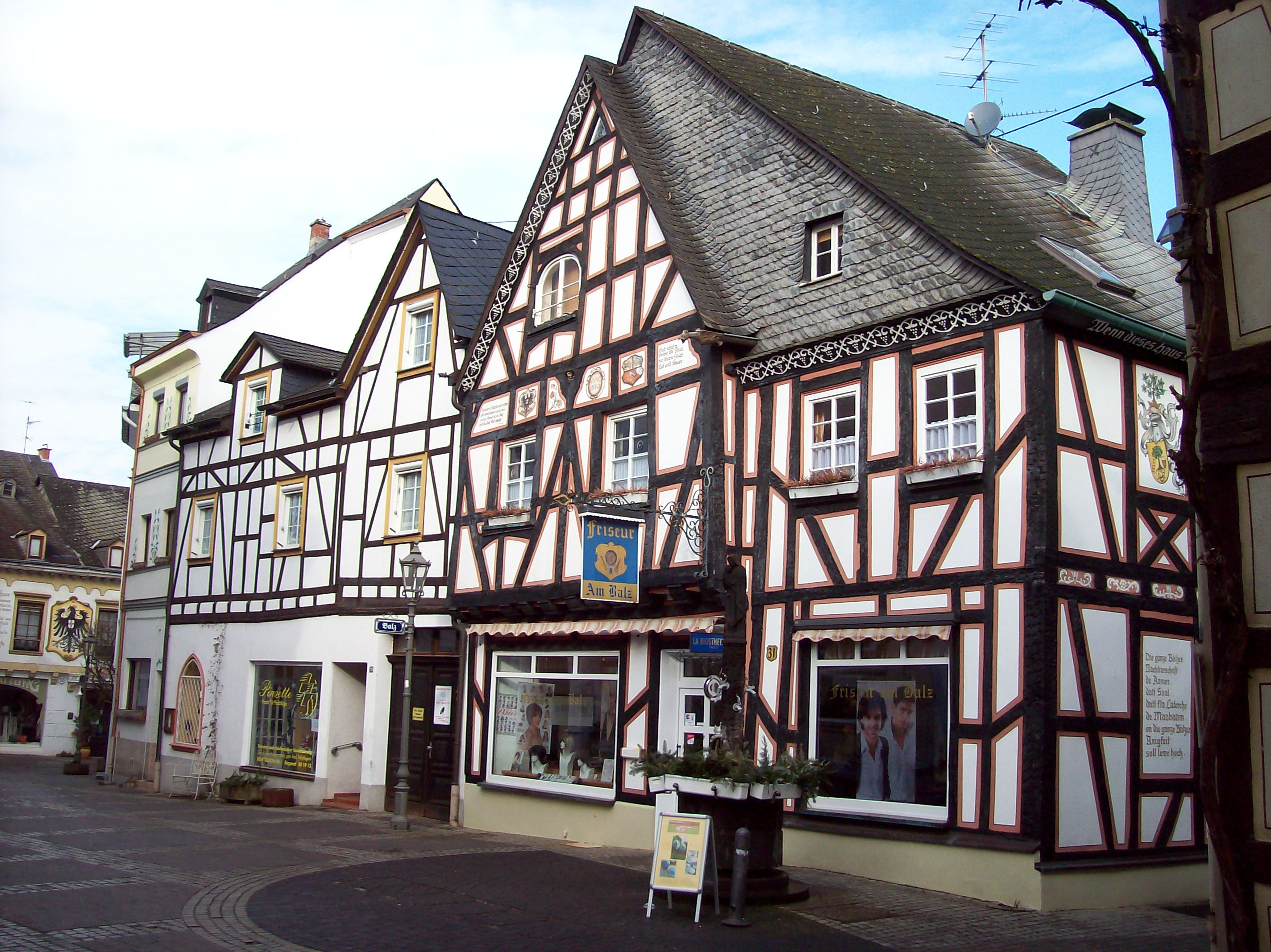 Gebäude der Steinstraße 29 und 31 in Boppard; Das Gebäude mit der Hausnummer 31 steht unter Denkmalschutz.